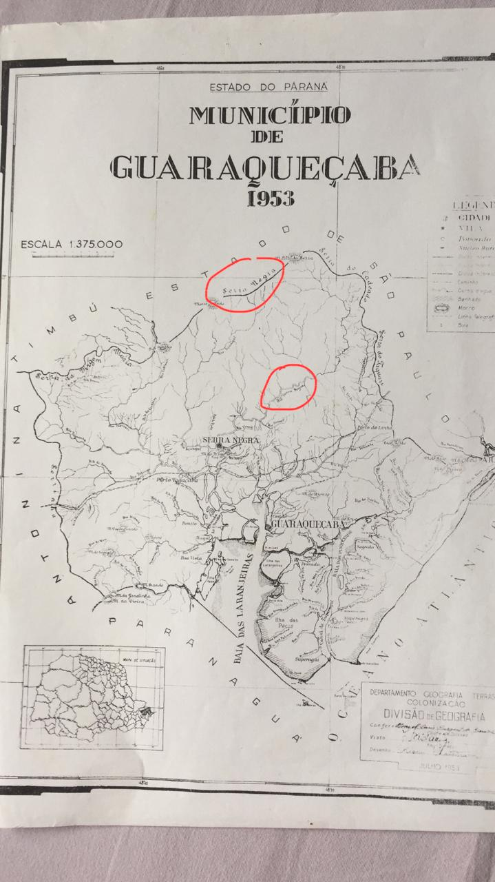 Serra Negra, Guaraqueçaba, Paraná, Brasil